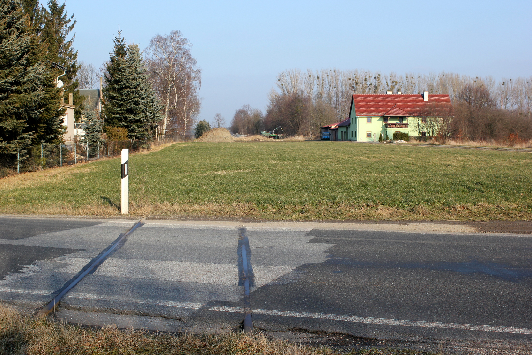 Hornjoserbsce: Měrkow; při starym dwórnišću.